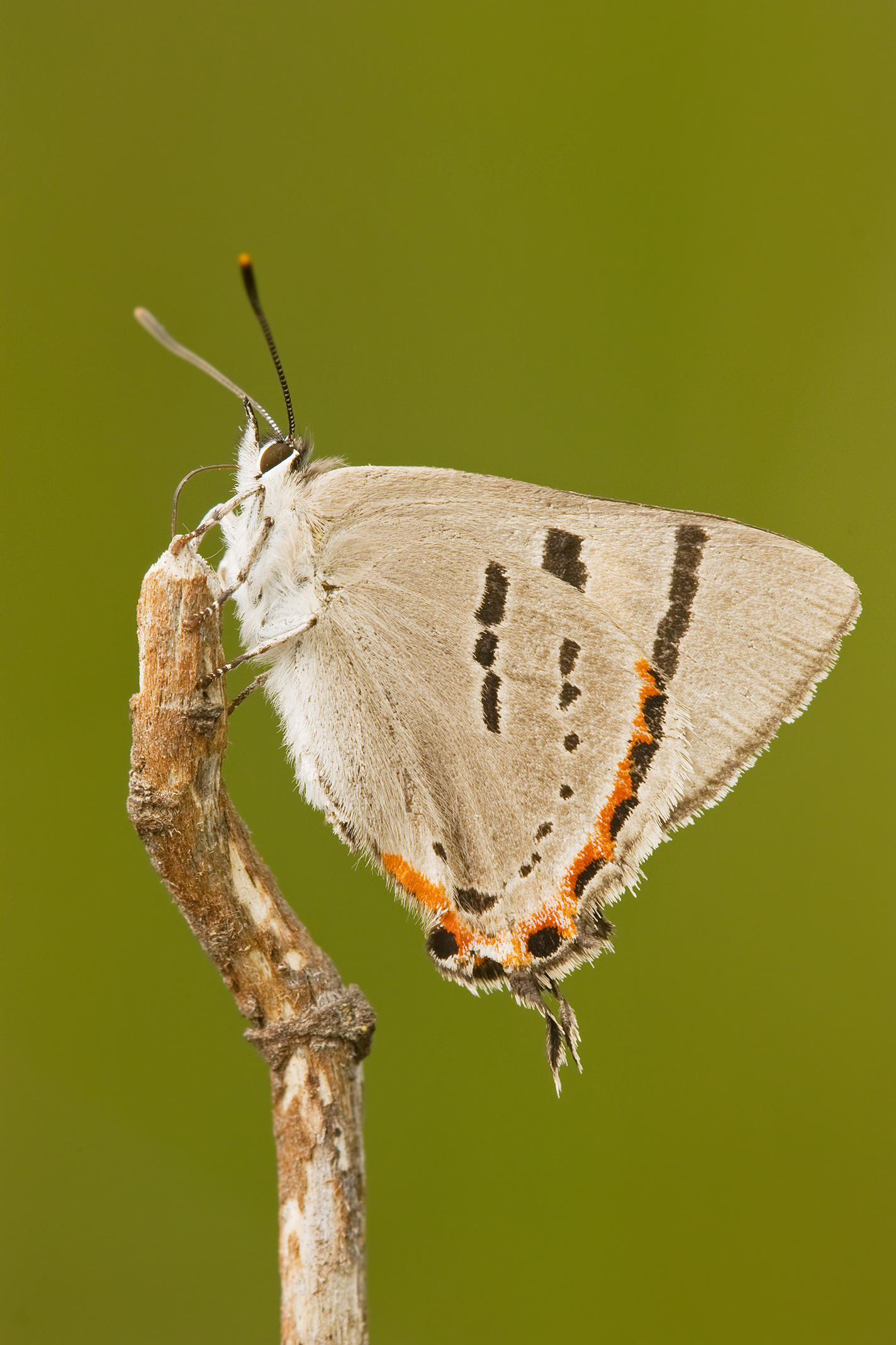 Tasmanian Hairstreak (Pseudalmenus chlorinda), Tasmania, Australia